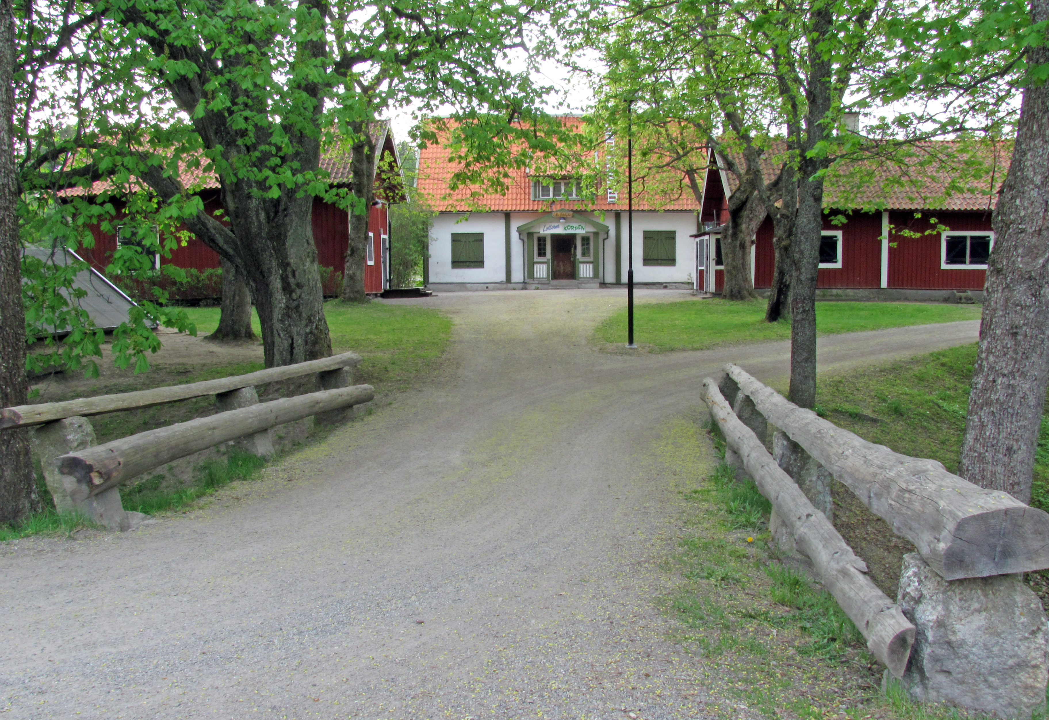 Rudans gård, Handen, Haninge kommun